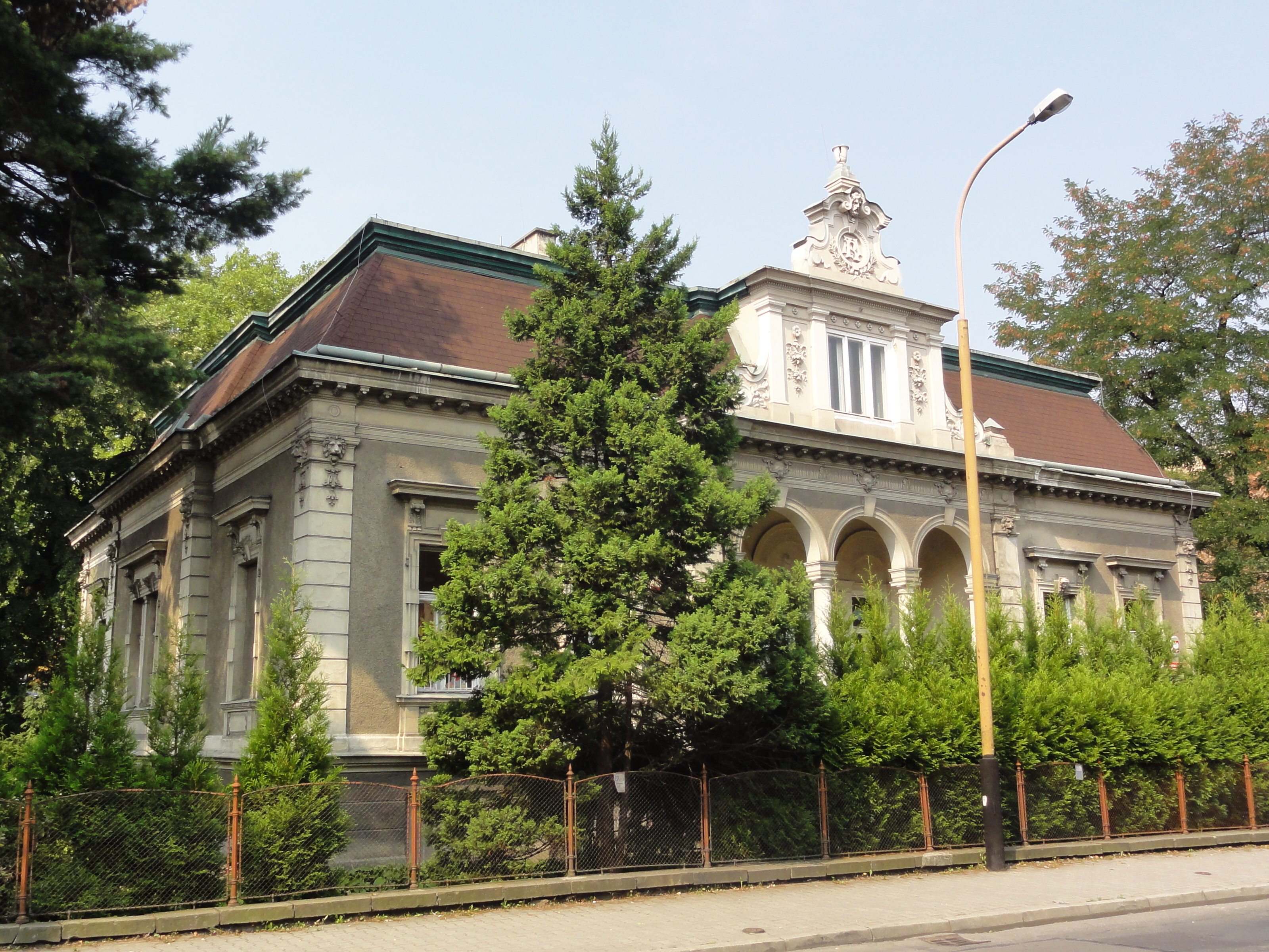 Przedszkole nr 27, Bielsko-Biała, Legionów 21